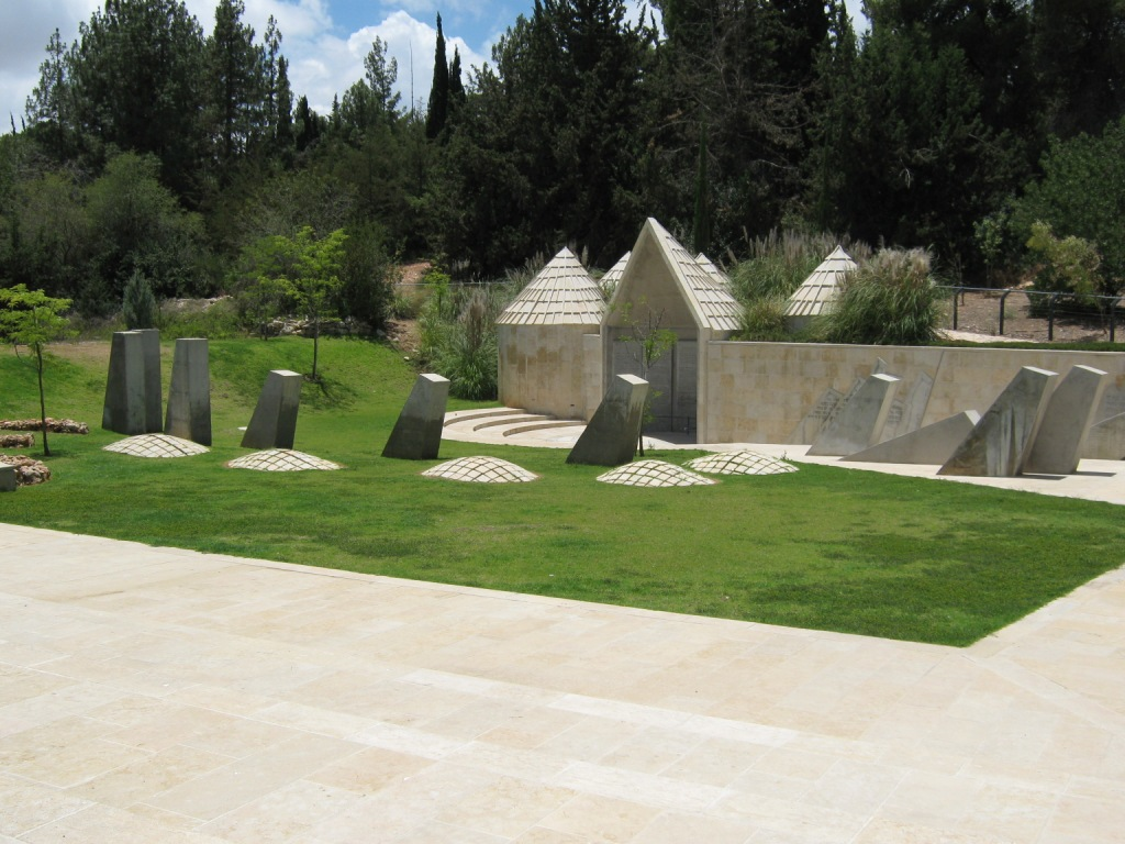 אתר ההנצחה ליהודי אתיופיה שניספו בדרכם לישראל, הר הרצל, ירושלים